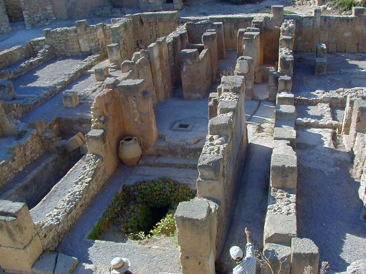 maison punique n°4 de l'ilôt C, byrsa (Carthage)